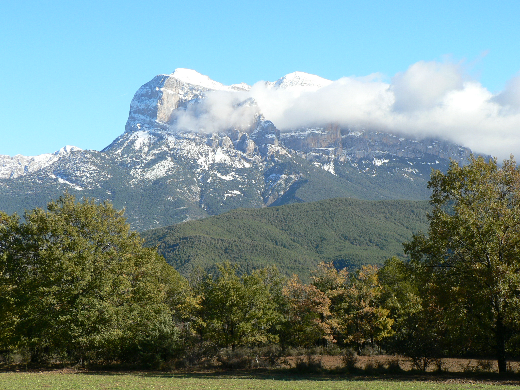 La Peña Montañesa, en Sobrarbe, que con sus 2291m pone el remate final a la llamada Sierra Ferrera, sierra transversal que cruza desde la Ribagorza hasta el Sobrarbe oscenses.